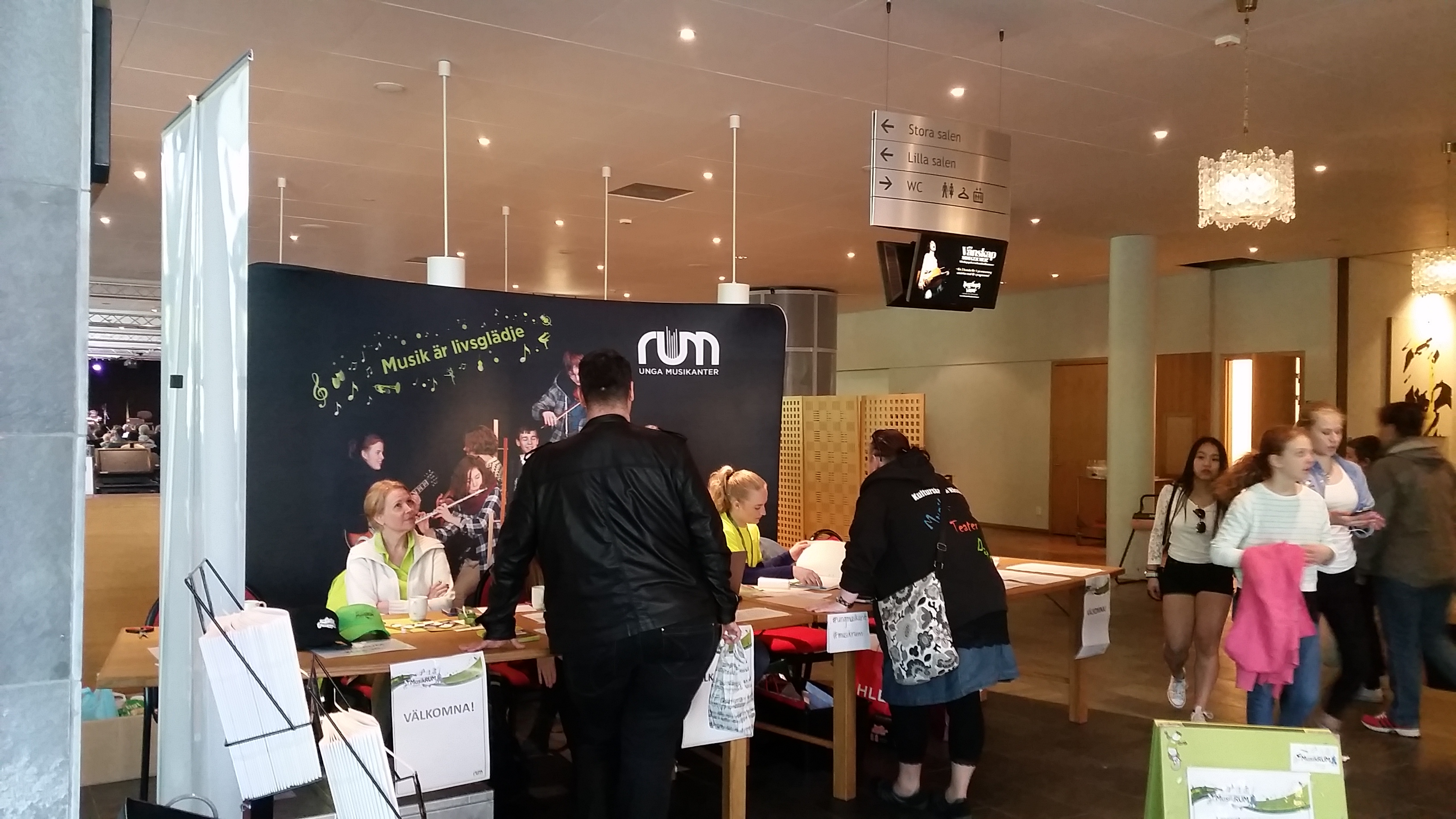 Informationsdisken i foajén på Västerås konserthus under MusikRUM 2015.